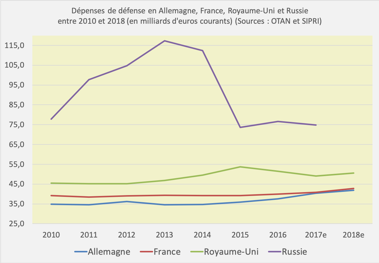 Sources OTAN pour Allemagne, France, et Royaume-Uni ainsi que pour les cours de change. Source SIPRI pour la Russie.